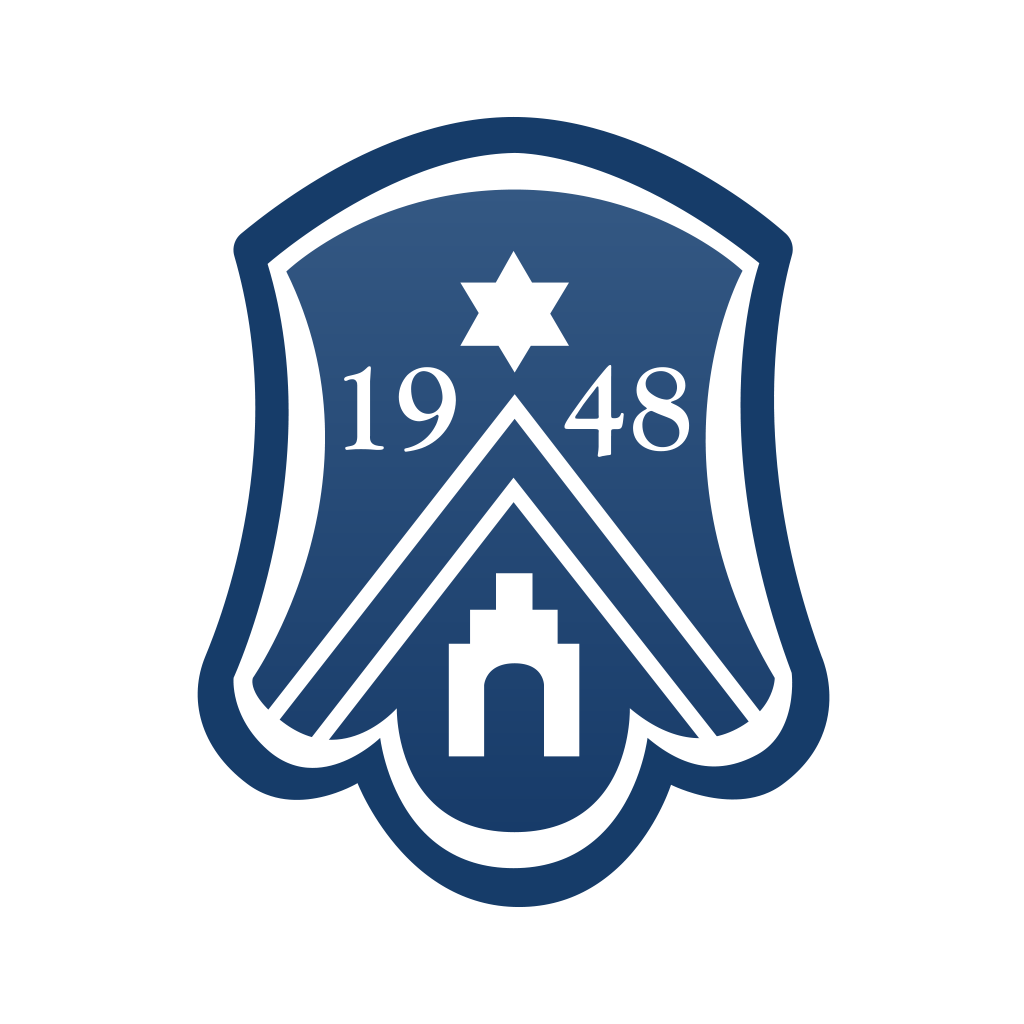 Logo der Schule Schloss Stein an der Traun